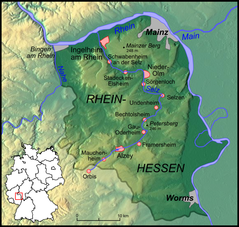 Verlaufskarte Selz in Rheinhessen Cours d'eau de Selz en Rhénanie-Palatinat